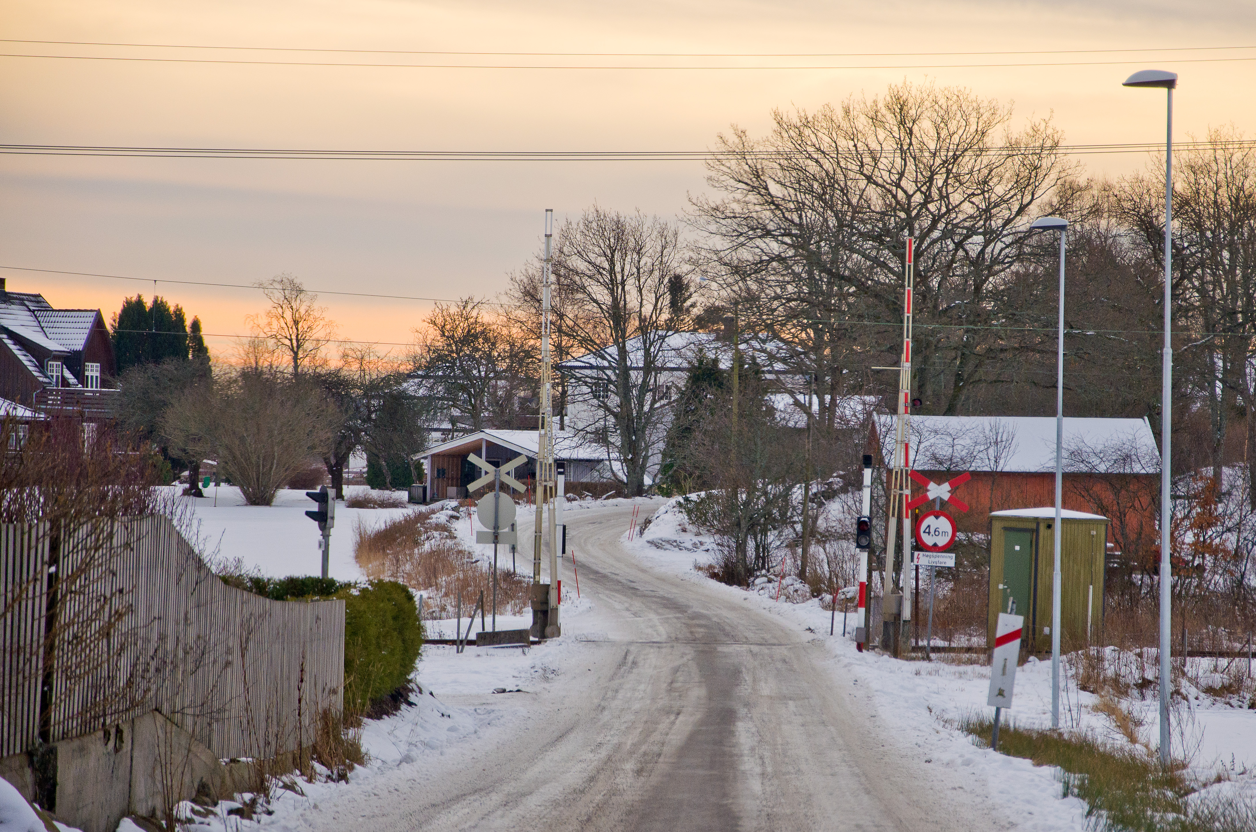 Fylkesvei 154 Østbyveien i Larvik. Planovergang over Vestfoldbanen.